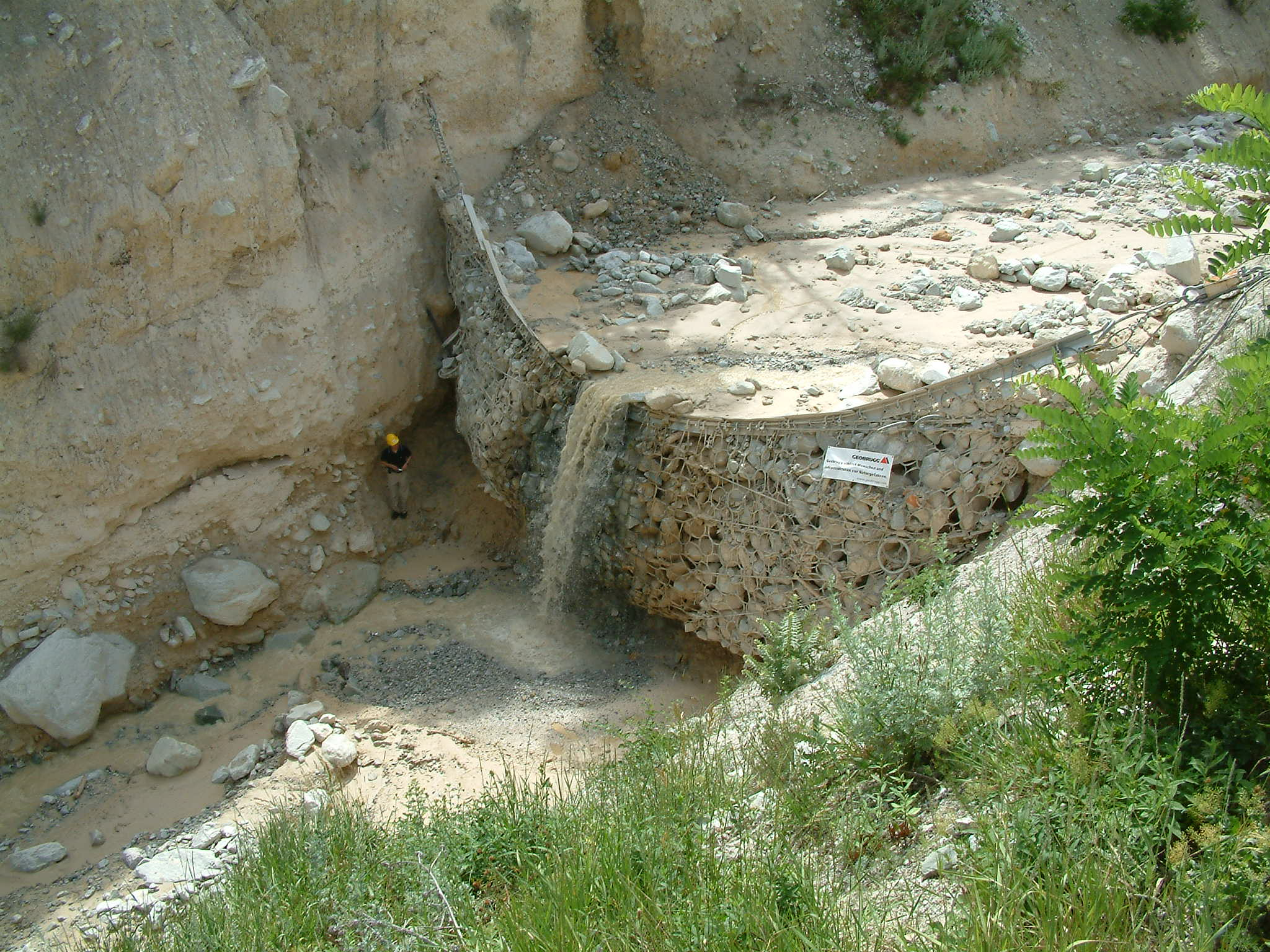 Bariera przeciwrumowiskowa oparta na siatce pierścieniowej wysokiej wytrzymałości (rozwiązanie firmy Geobrugg AG) po zatrzymaniu spływu gruzowego o objętości ponad 1000 m³